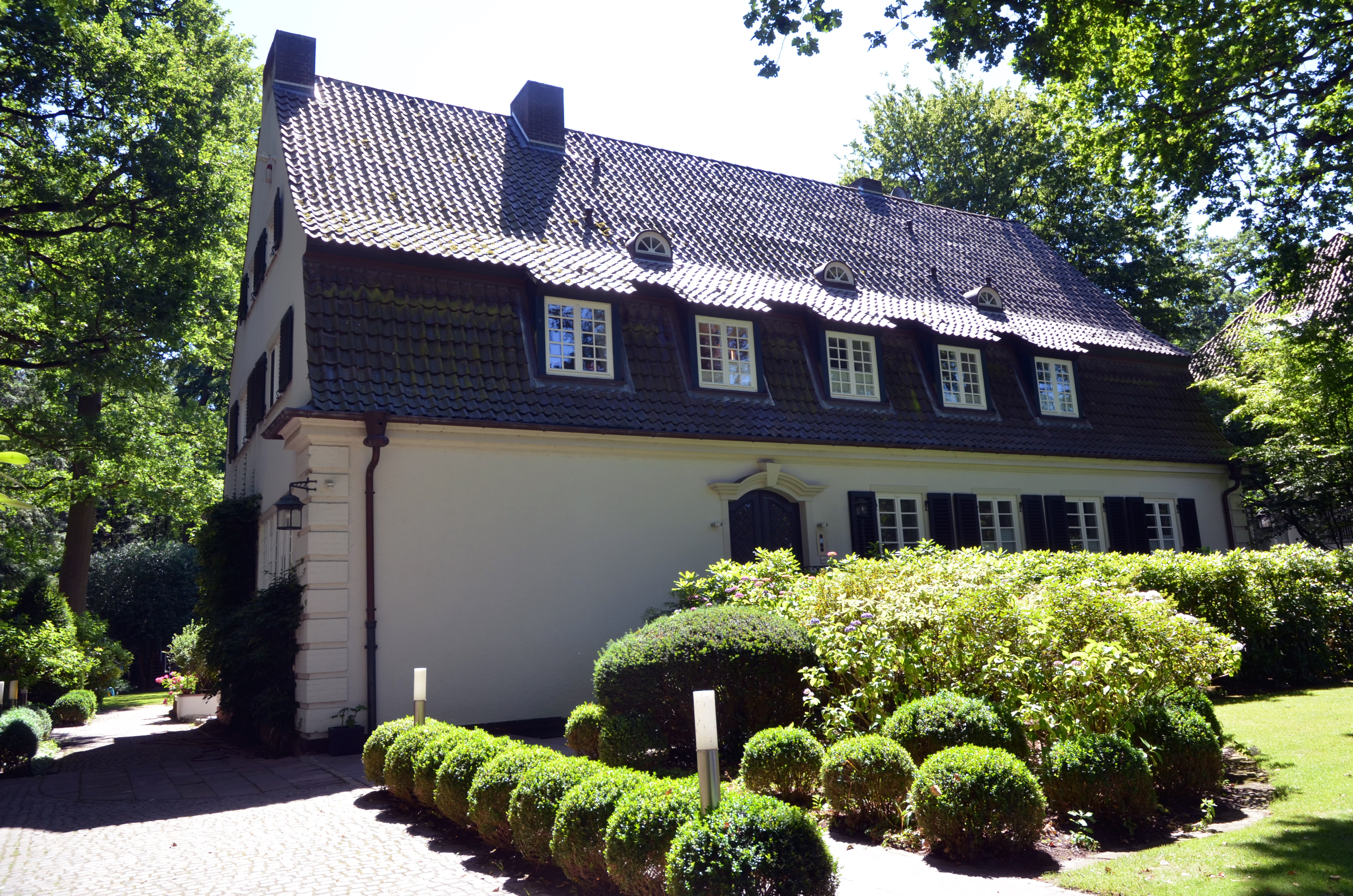 Das heute denkmalgeschützte, in den Jahren 1923 bis 1924 von dem Architekten Paul Bonatz für die Familie des Landesforstmeisters Walter Liebrecht mit dem Charakter eines Forsthauses im Heimatstil errichtete Haus Liebrecht in der Schopenhauerstraße 28 in Hannover-Kleefeld ...